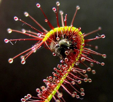 Recadrage de l'image Image:Drosera capensis bend.JPG